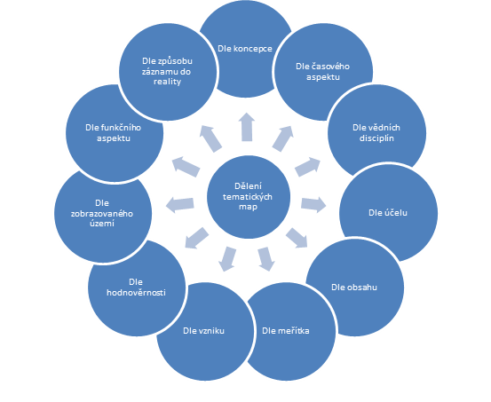 Základní dělení tematických map